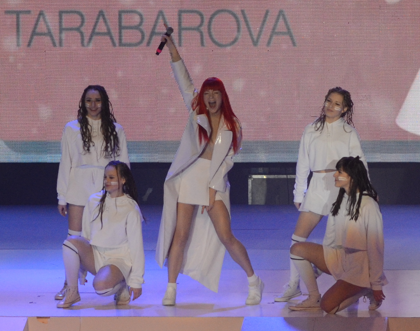 Урочиста церемонія проводів національної паралімпійської збірної команди України на XII зимові Паралімпійські ігри. Виступ Світлани Тарабарової